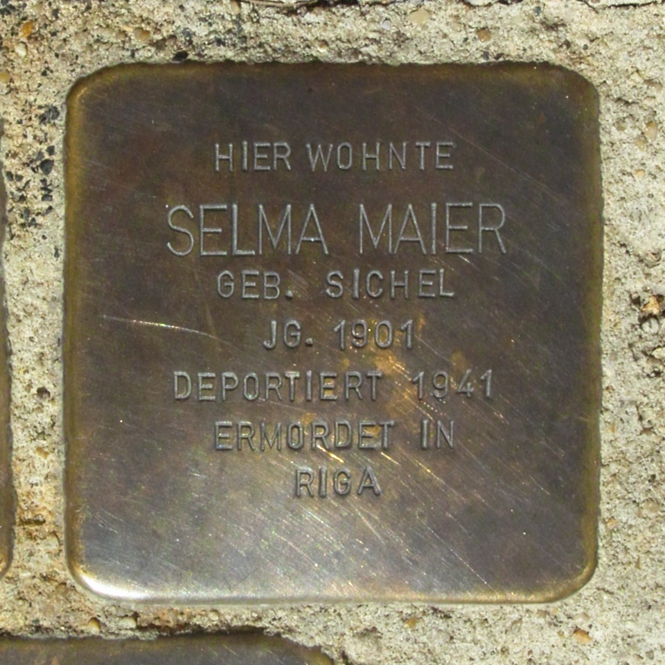 Stolperstein für Selma Maier in D-74081 Heilbronn(-Horkheim), Hohenloher Straße 15